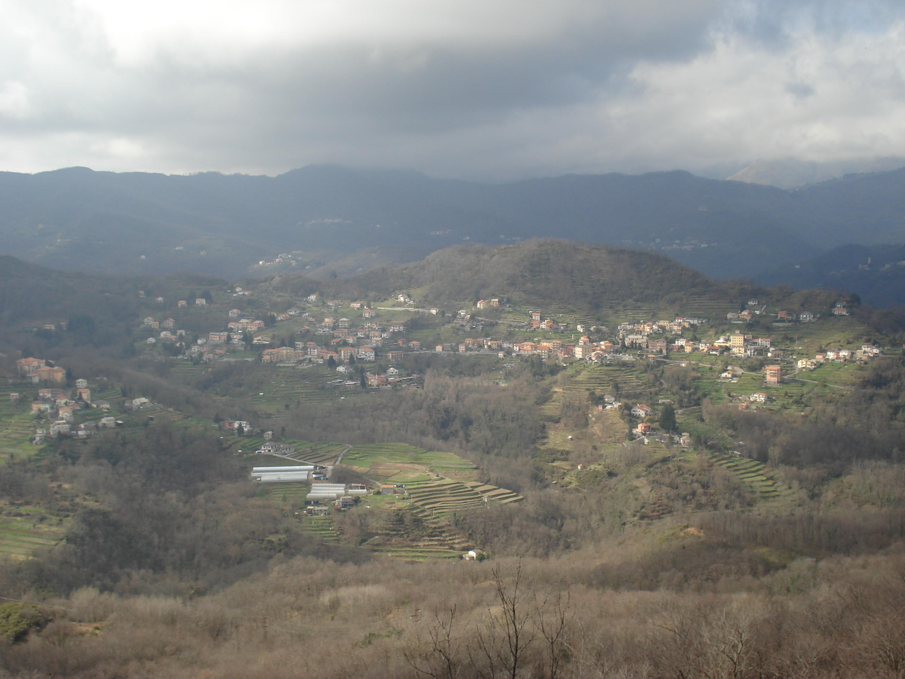 Cosmin latan,16-03-2008,Lumarzo